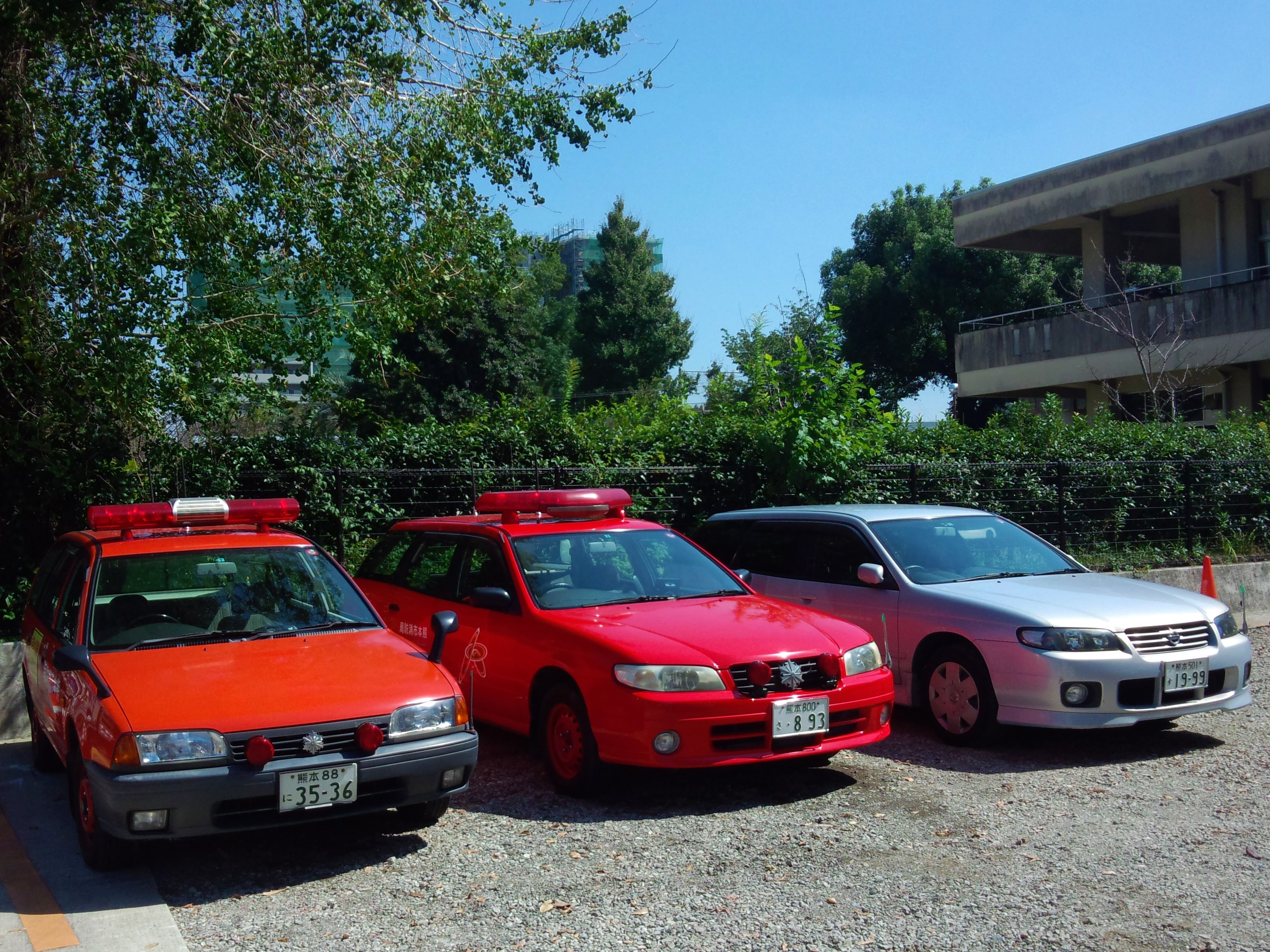 日産・アベニール（左右）と日産・エキスパ－ト（中）。熊本市消防局の駐車場にて撮影